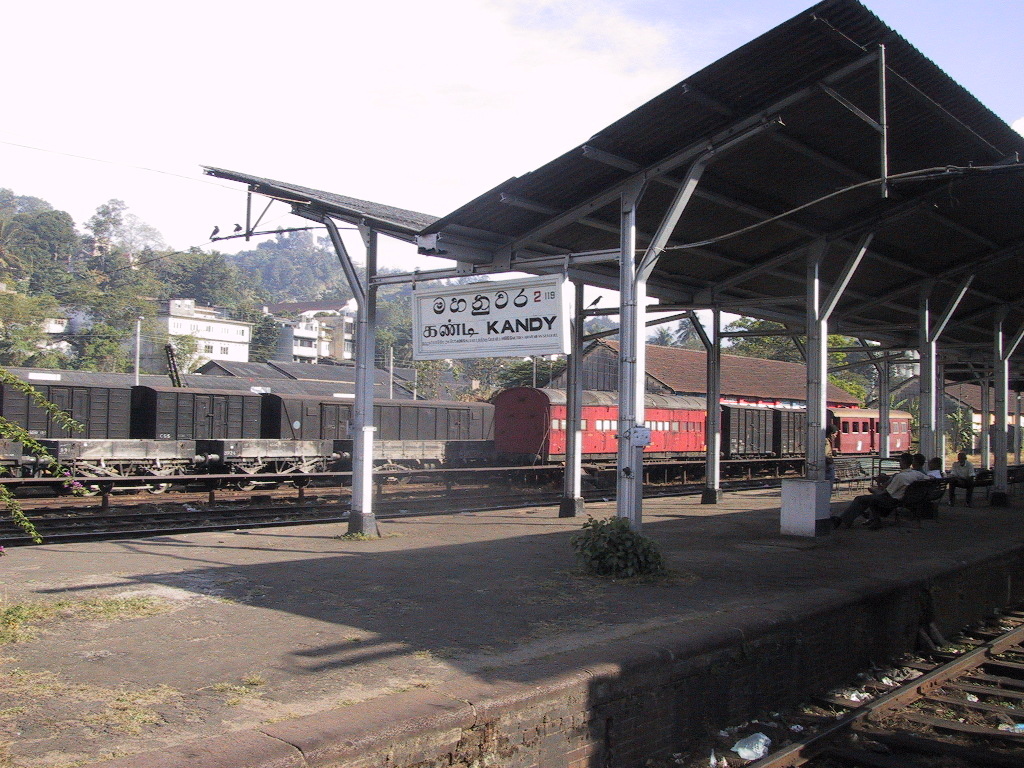 Bahnhof von Kandy, Sri Lanka